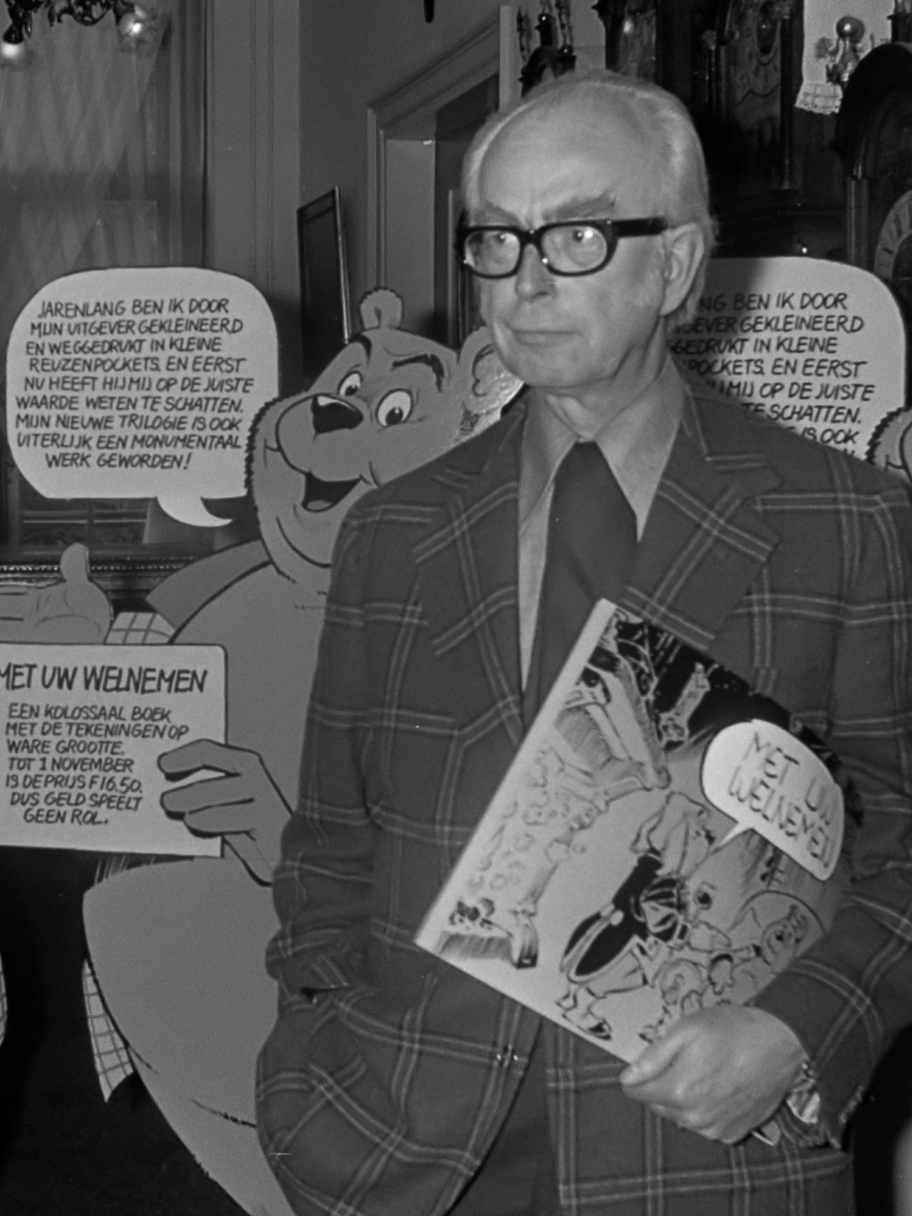 Maarten Toonder presenteert nieuwe Bommel-uitgave in Kasteel Nederhorst 12 oktober 1973